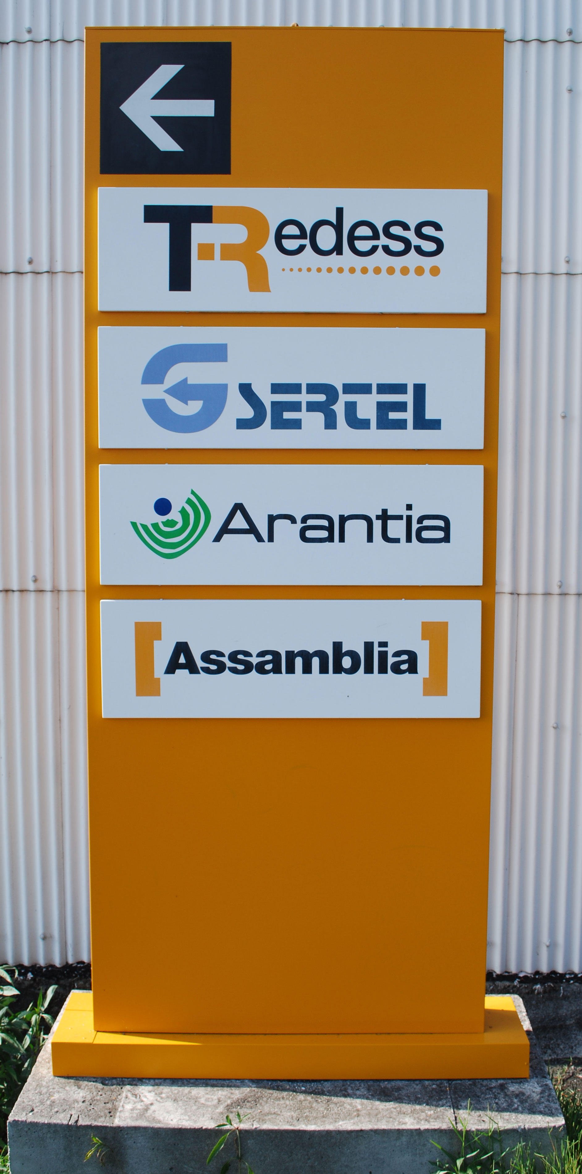 Cartel de acceso a Tredess Gsertel Arantia Assamblia Televés Conxo Santiago de Compostela Galiza A Coruña Spain